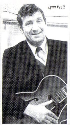 Rockabilly singer Lynn Pratt